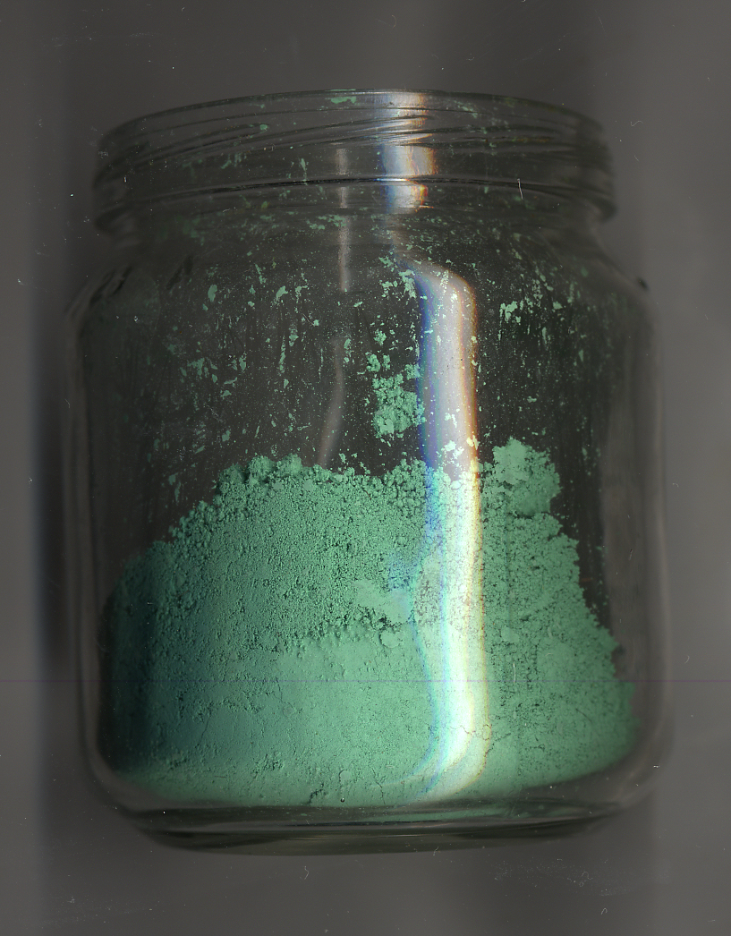 Carbonato di rame (II) in polvere